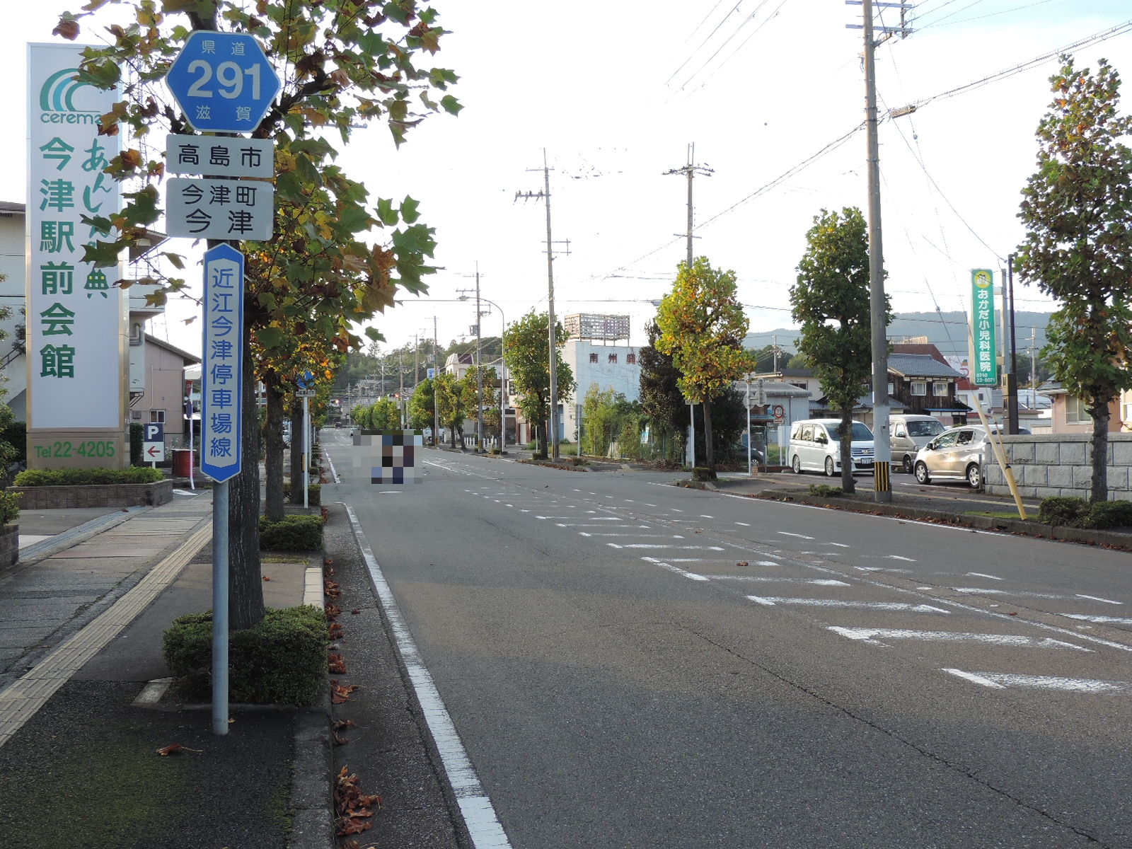 滋賀県道291号今津停車場線。高島市今津町今津にて。2017年撮影。